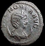 Portret van koningin Zenobia op een antoninianus. Foto met toestemming van Classical Numismatic Group, Inc. (CNG). Uiterst zeldzame munt, geslagen in Syrië(?) rond 272. Legende (voorzijde): S ZENOBIA AVG (voor Septimia Zenobia, keizerin). Munt van CNG coins. Toestemming voor gebruik.